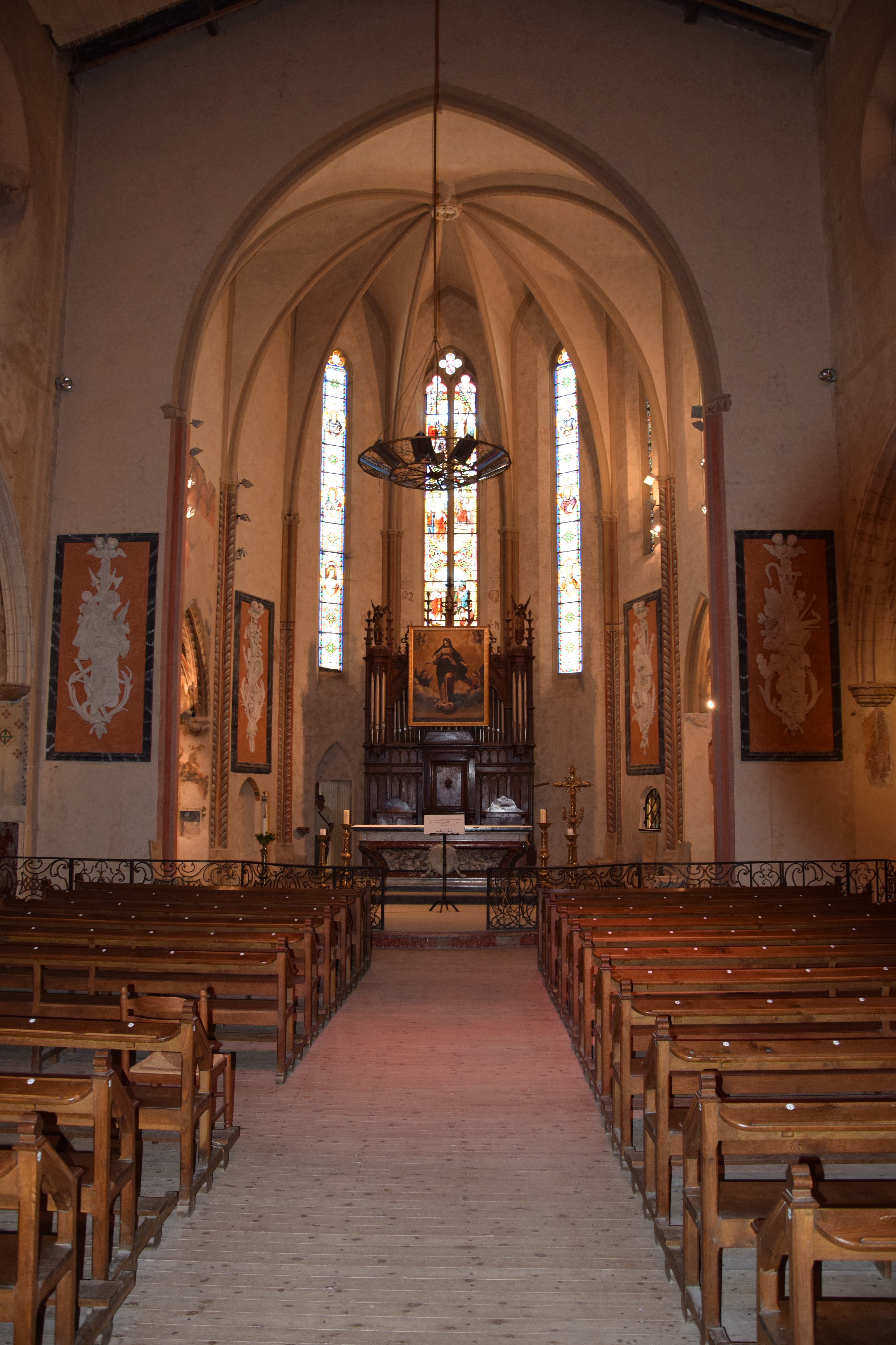 Église Saint-André à Alet-les-Bains .